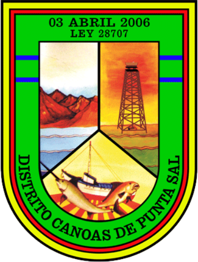 Bandera del distrito Canoas de Puntal Sal, Provincia de Contralmirante Villar, Región Tumbes